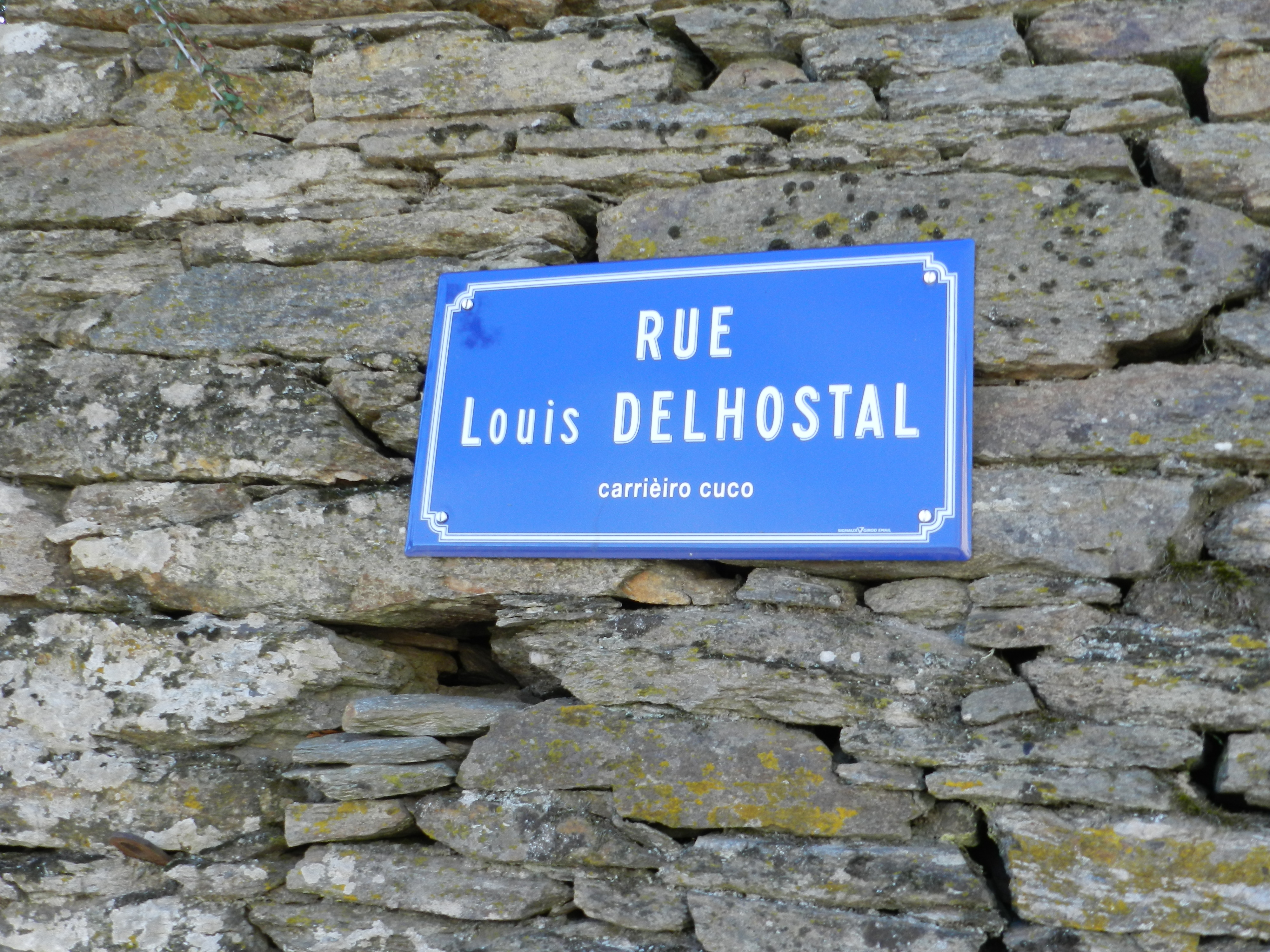 Une rue du village, nommée ainsi en hommage à l'érudit Louis Delhostal